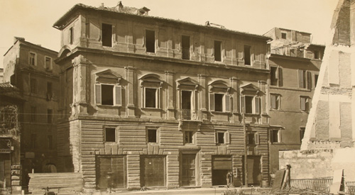 Fotografia del Palazzo di Jacopo da Brescia di Raffaello poco prima della demolizione